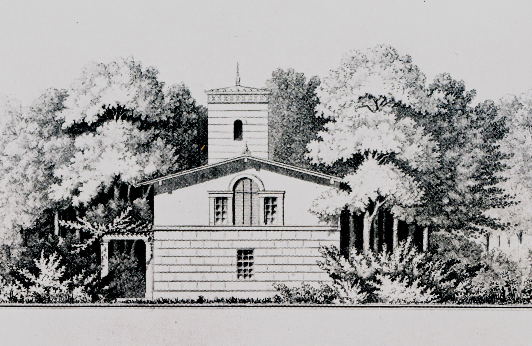 Das Matrosenhaus im Park Klein-Glienicke, Zeichnung von Ludwig Persius, um 1840